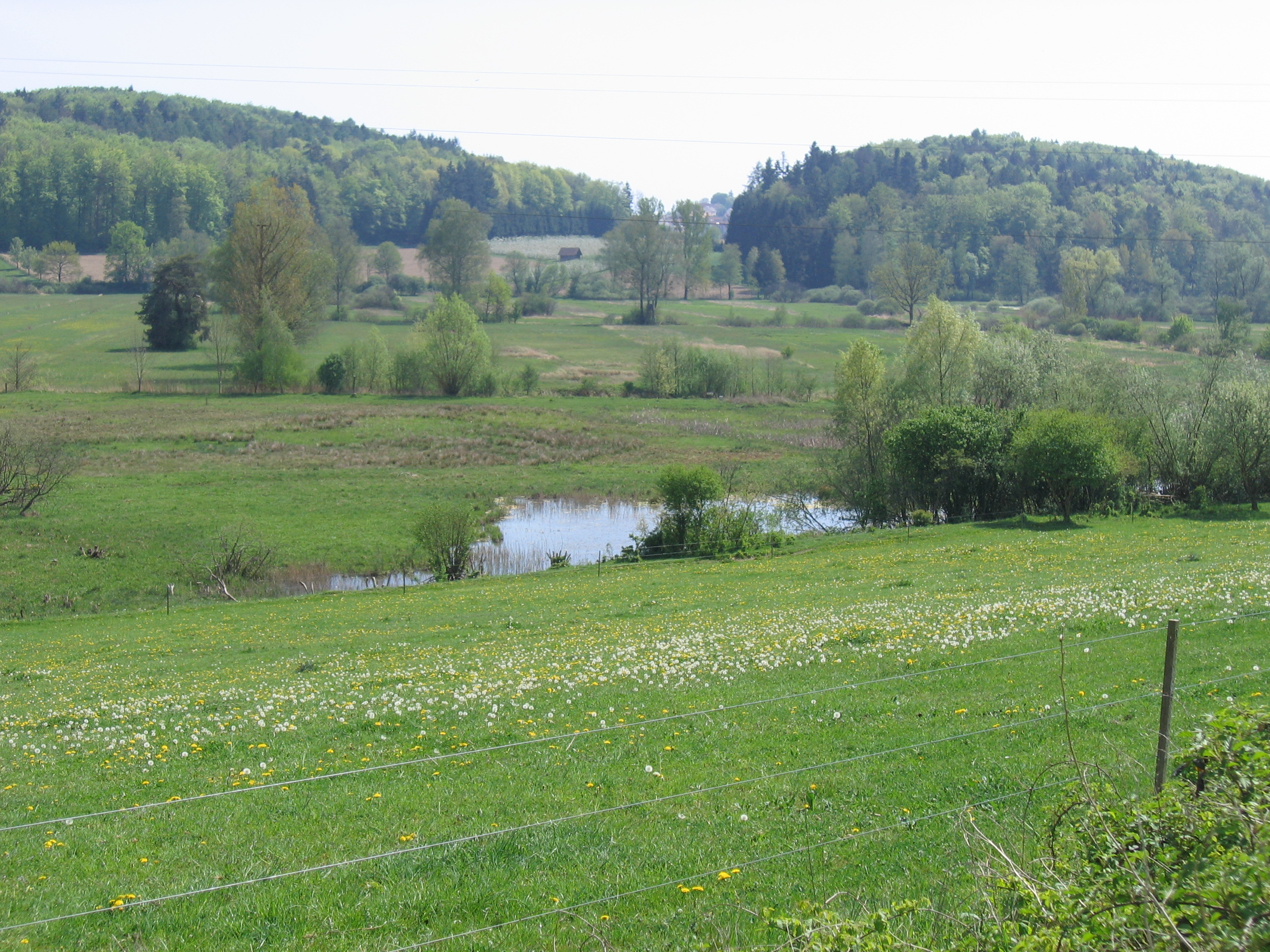 Deutschland - Baden-Württemberg - Bodenseekreis - Friedrichshafen/Markdorf/Oberteuringen: Natur- und Landschaftsschutzgebiet Hepbacher-Leimbacher Ried